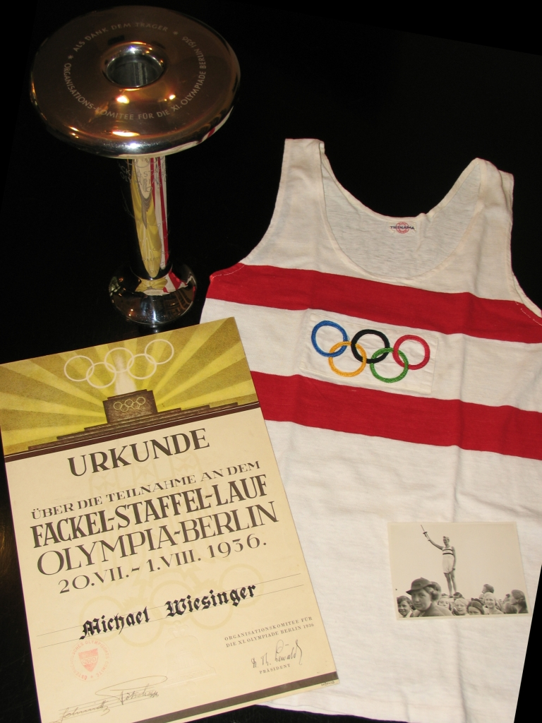 Fackel-Staffellauf Olympia-Berlin 1936: Fackel, Trikot, Urkunde und Foto eines Teilnehmers